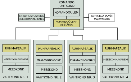 Paastekomando struktuur